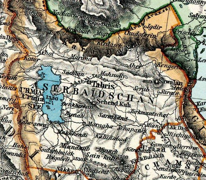 Iran & Turan